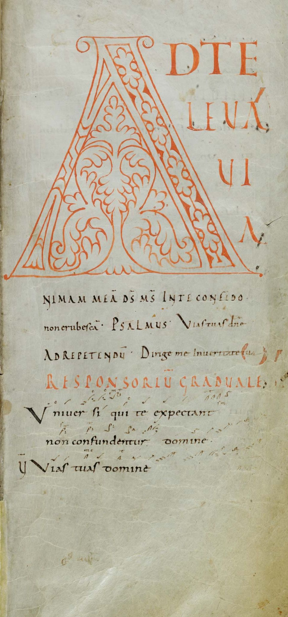 Seite 25 des Codex Sangallensis 359 - Ad te levavi